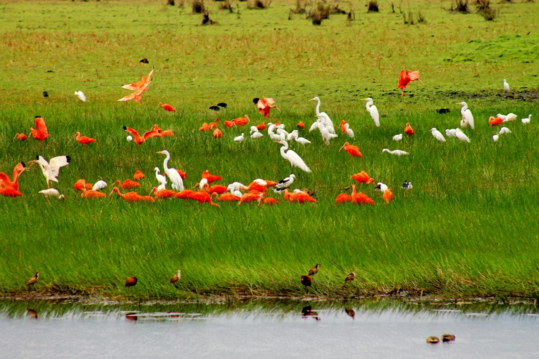 Paisaje llanero, sus garzas de colores ven y disfruta de un atardecer llanero rodeado de la naturaleza con sus hermosas especies.